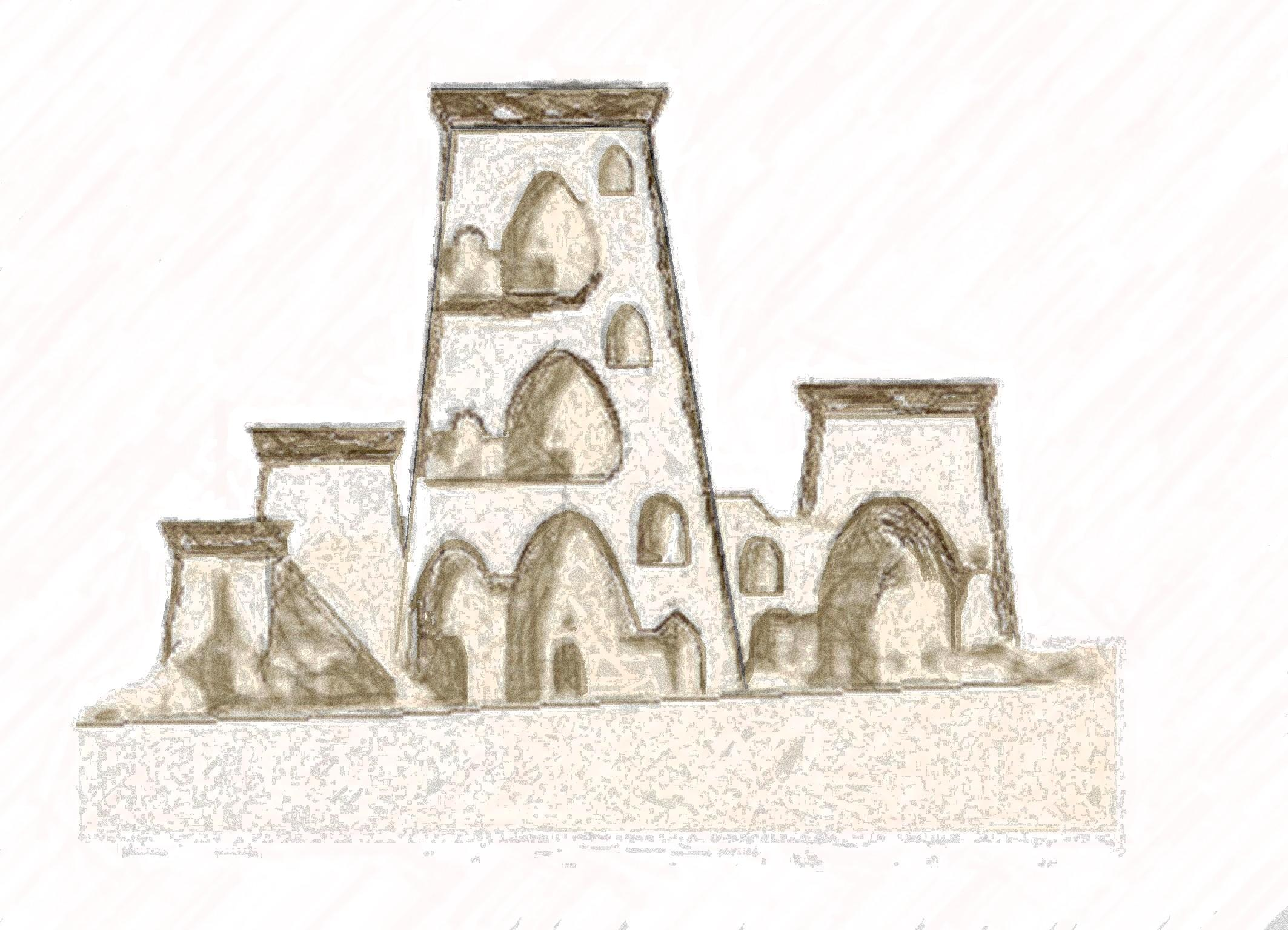 Sardinia- Nuraghe Santu Antine